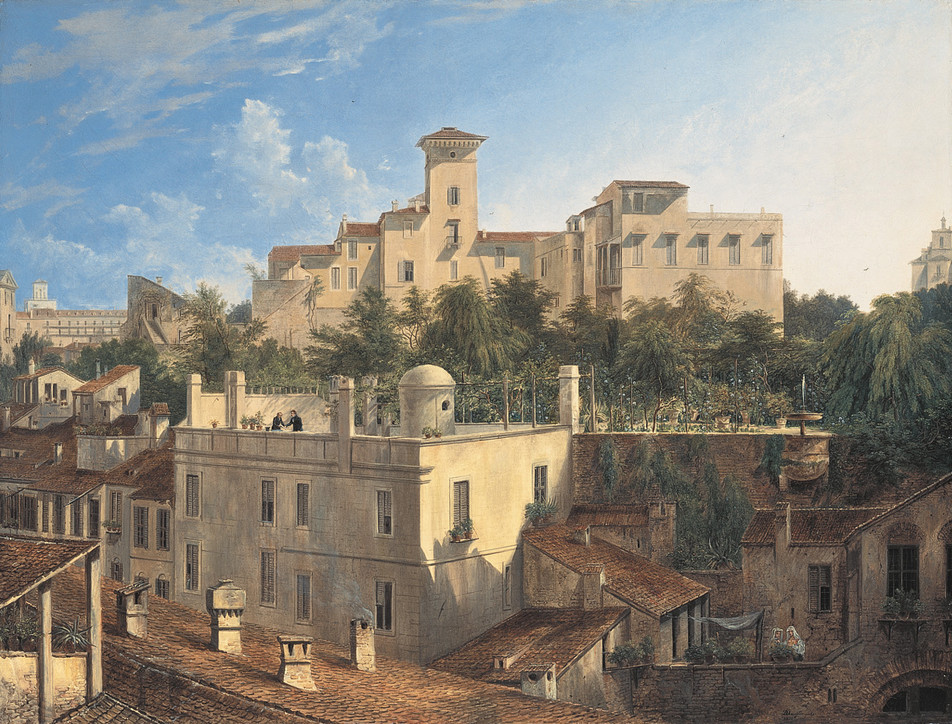 1830 durch König Ludwig I. vom Künstler erworben.